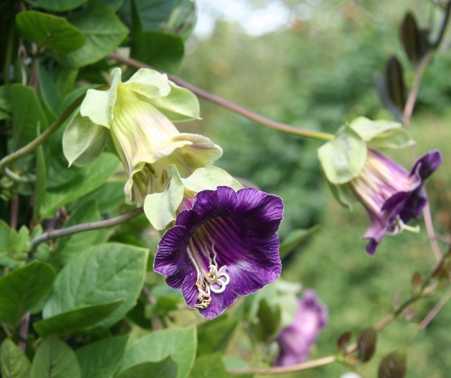 Cobaea scandens im Botanischen Garten Dresden